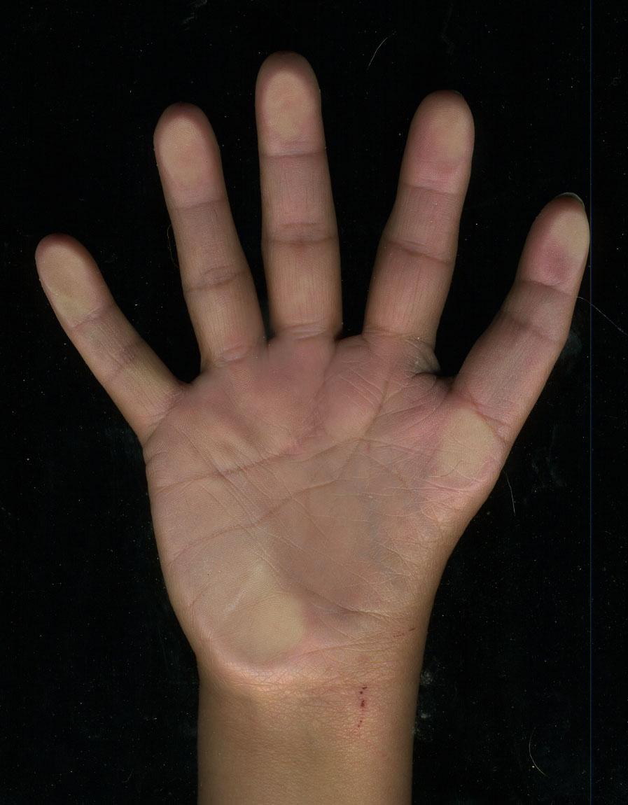 Triphalangie d'origine inconnue. Ici, la phalange intermédiaire est d'aspect normal à la radio, et le pouce apparait comme le symétrique de l'auriculaire. Main droite de l'artiste Lauranne, âgée ici de 49 ans. Le pouce n'est pas opposable, mais permet la préhension (l'artiste est droitière).